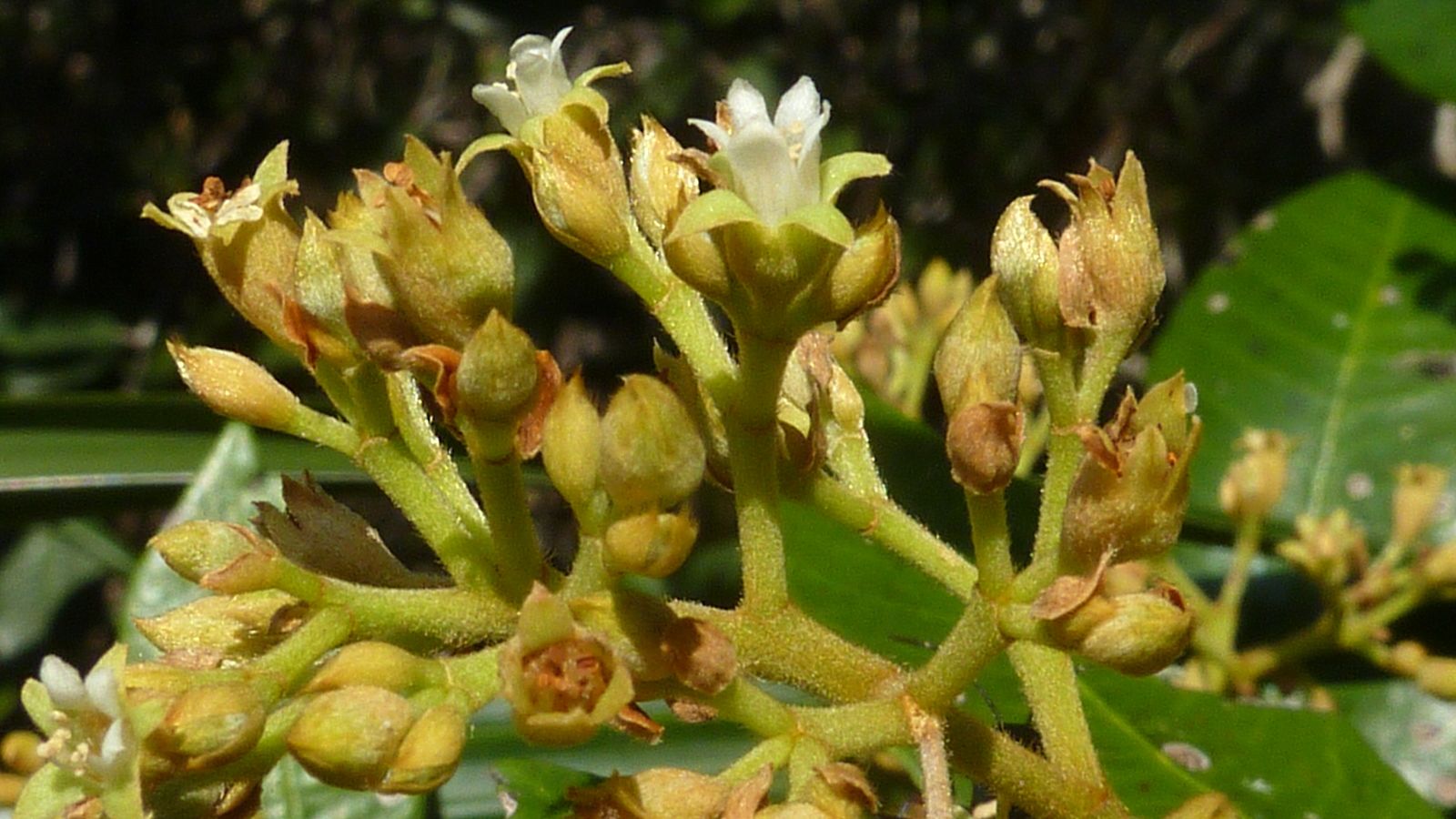 Parinari leontopitheci Prance